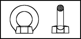 DIN 582